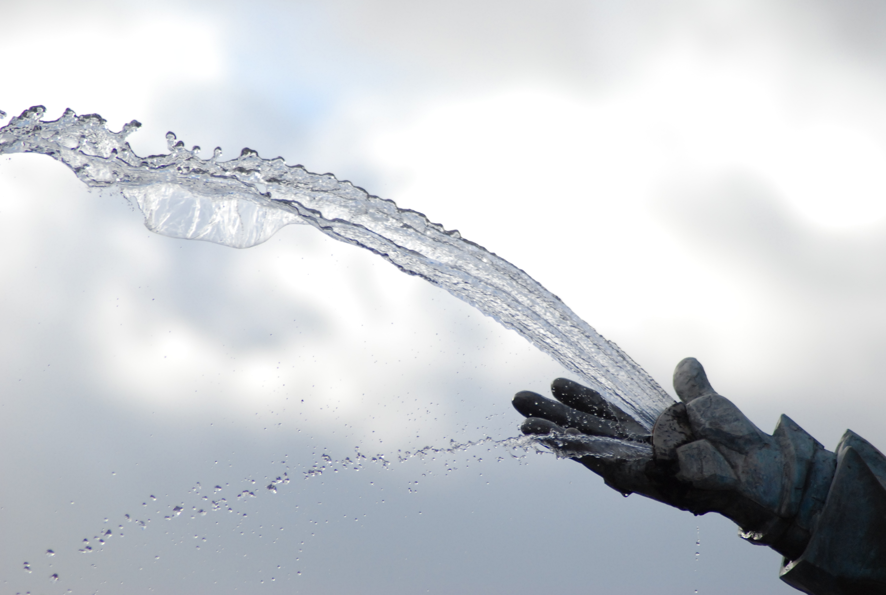 situation: Soignies, Place Verte, face à l'Hôtel de ville